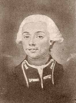 Gaspard Jean-Baptiste de Brunet en uniforme d'un officier du régiment d'infanterie de Lorraine